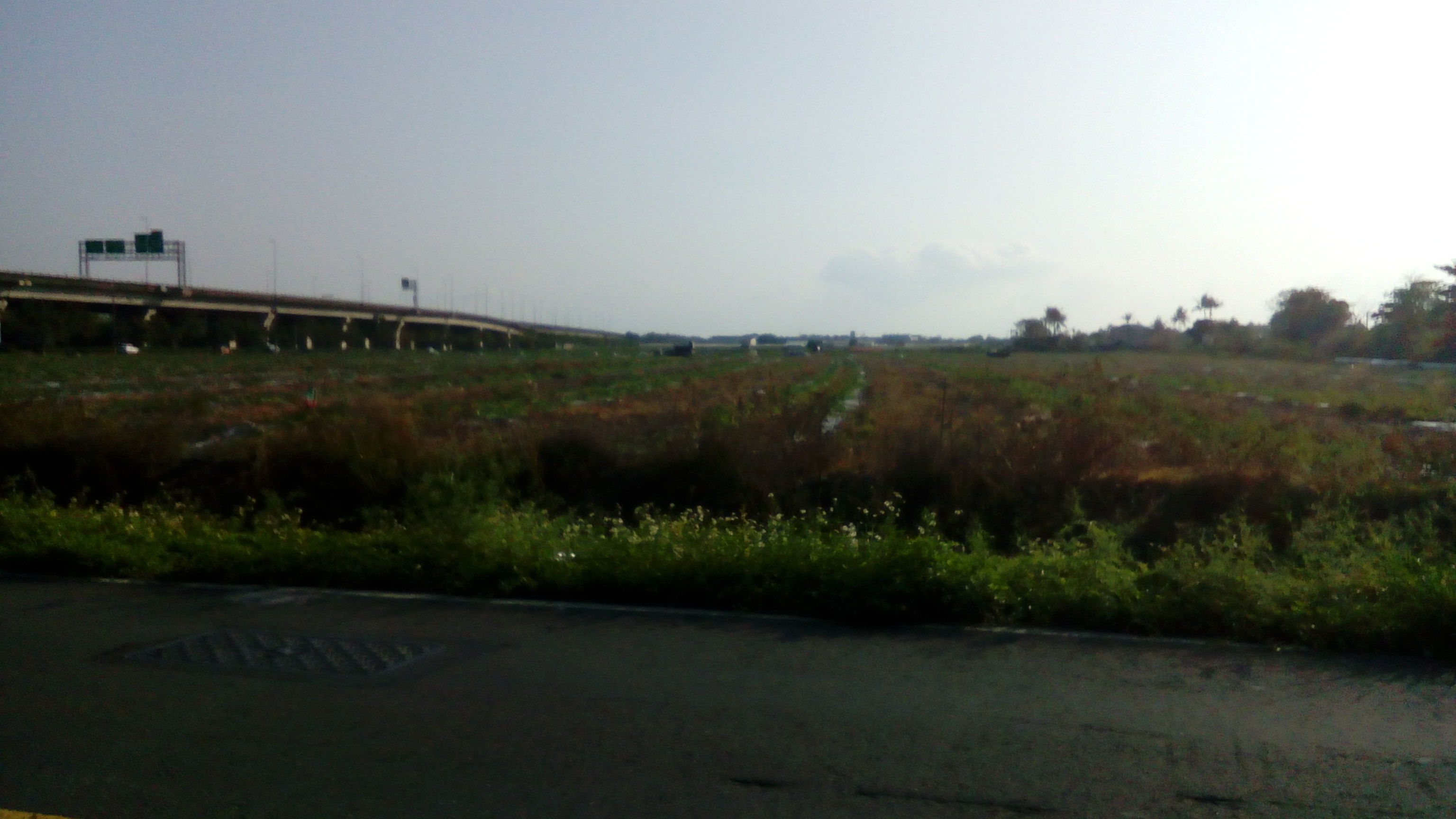 近南二高 麟洛交流道